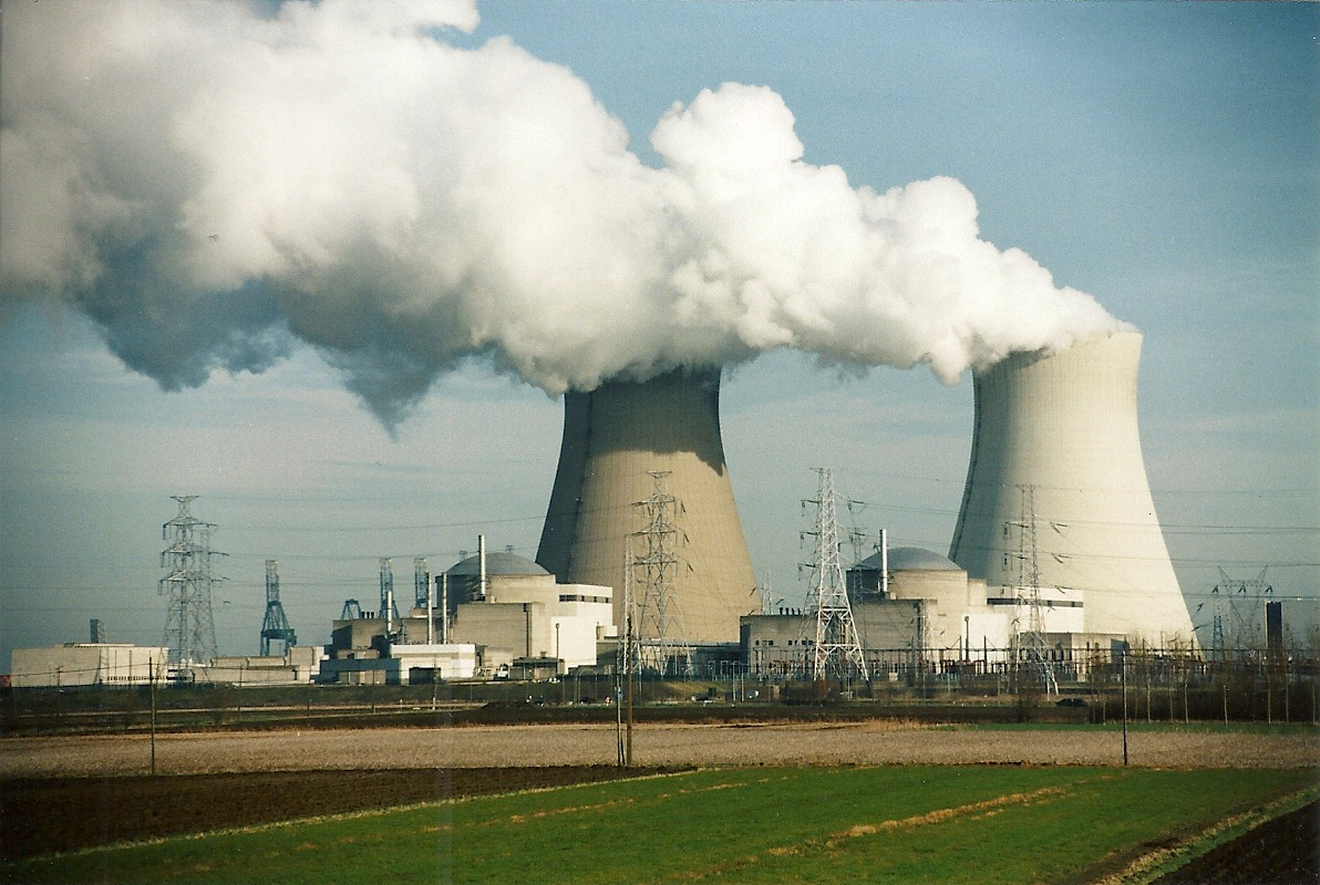 Foto van de nog in werking zijnde kerncentrale in Doel